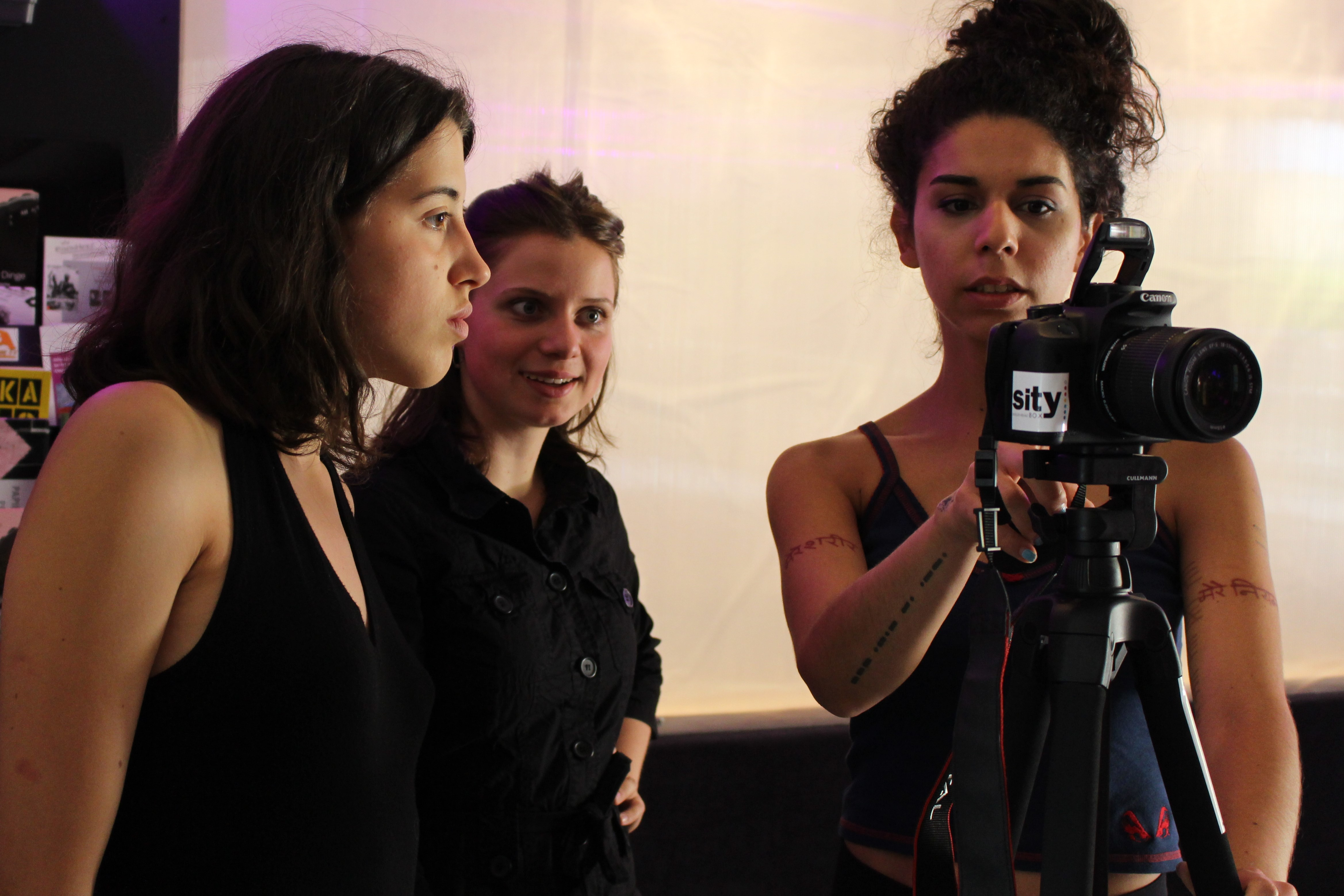 Im Rahmen eines Workshop erklärt eine Person die Nutzung einer Kamera.